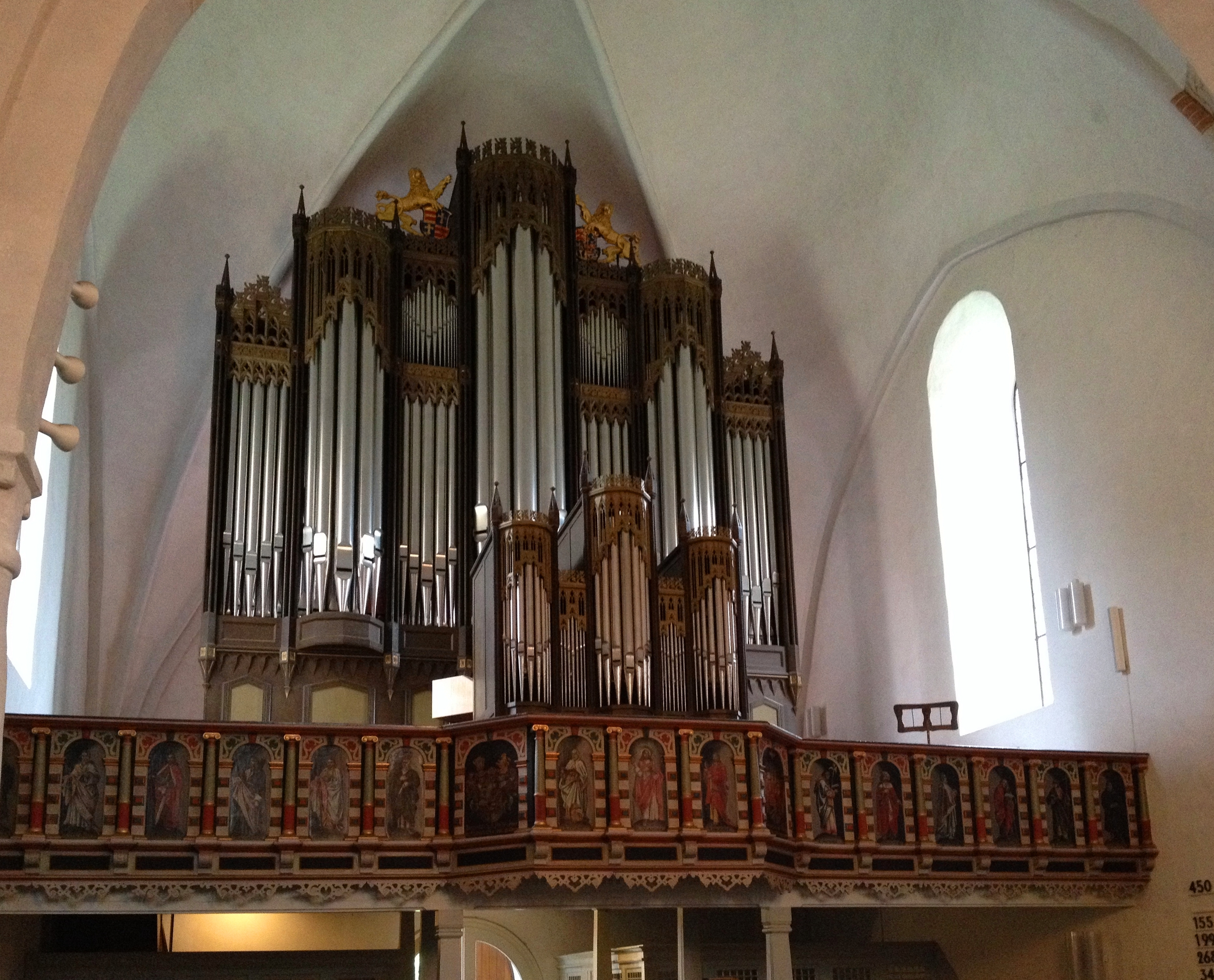 Varel, Schlosskirche, Orgel